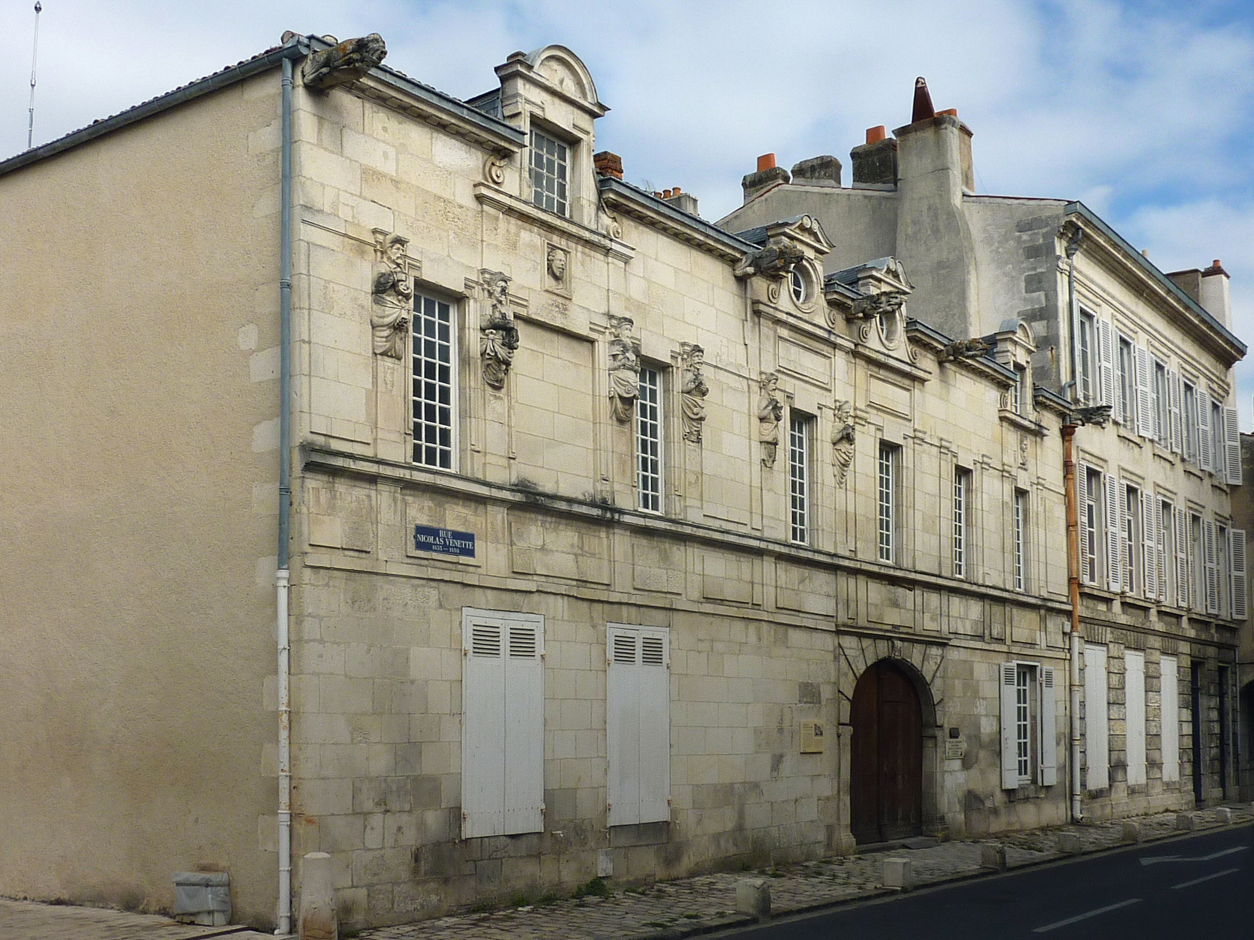 Maison dite de Nicolas Venette La Rochelle Charente Maritime France